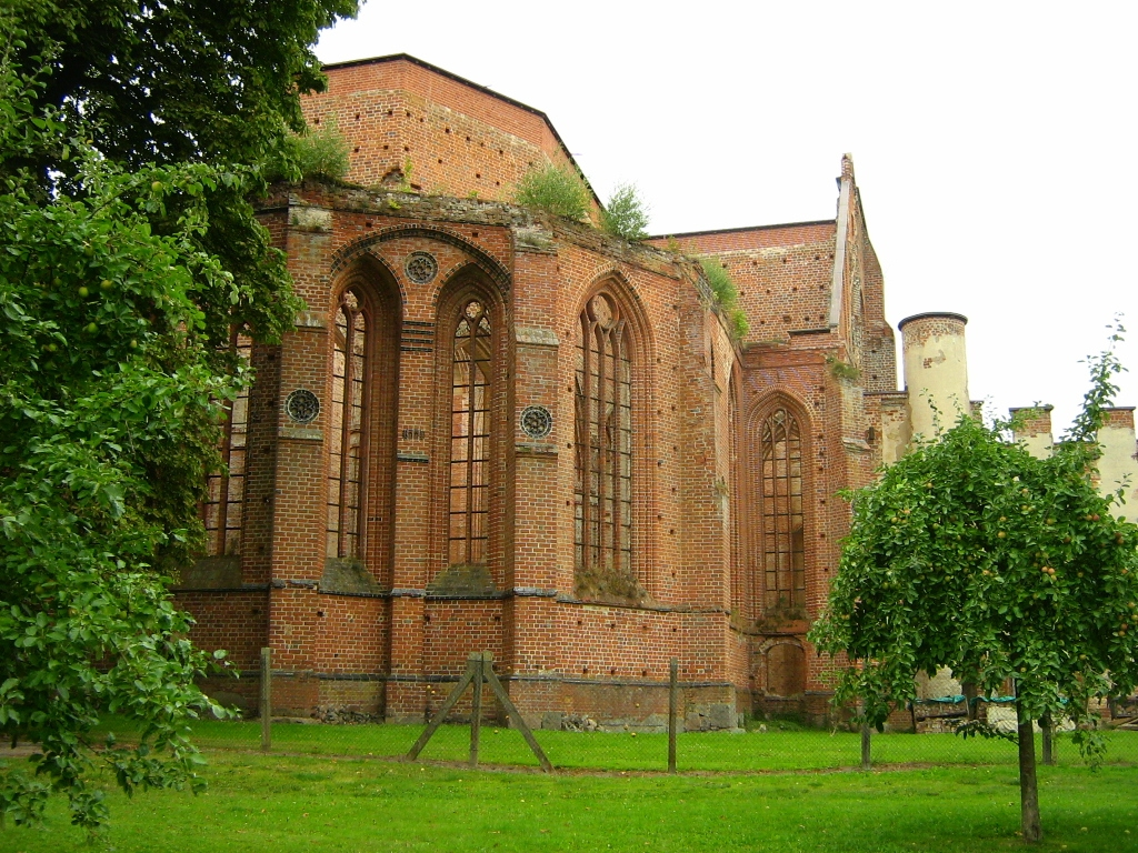 Außenansicht der ehm. Klosterkirche Dargun (Mecklenburg, Landkreis Demmin)).